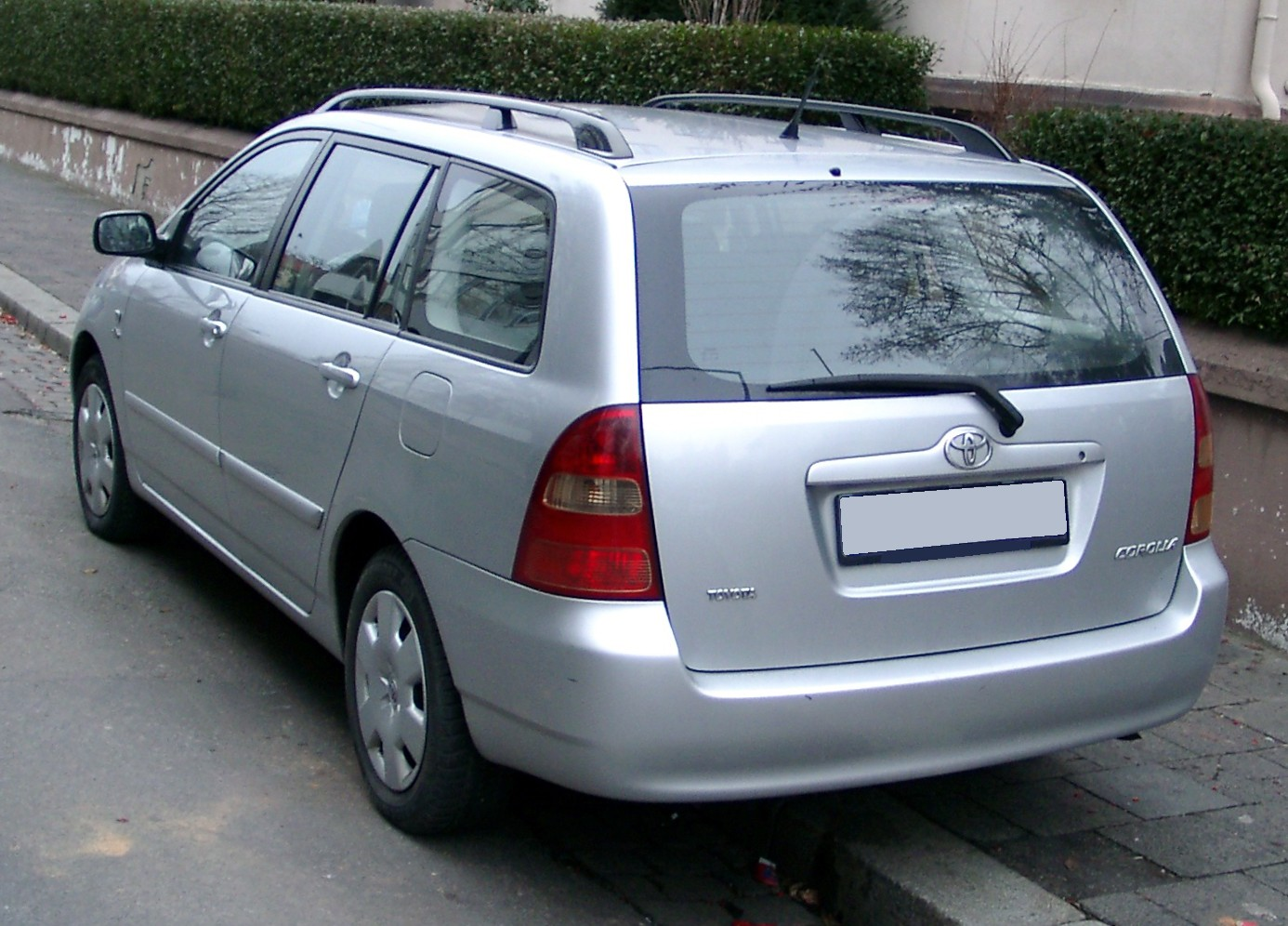 Toyota Corolla E120 Kombi